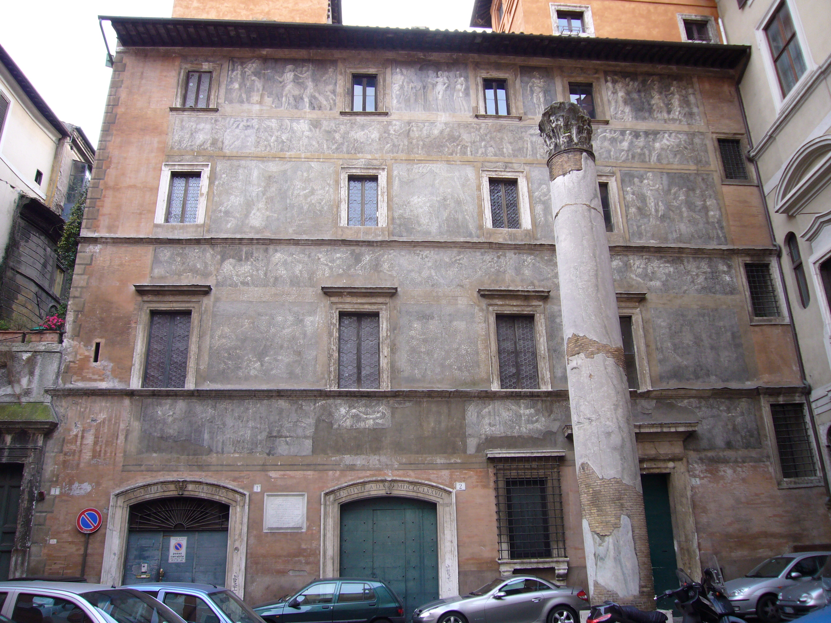 Roma, piazza dei Massimi e Palazzo Istoriato (Palazzetto Massimi) (facciata istoriata da Daniele da Volterra)